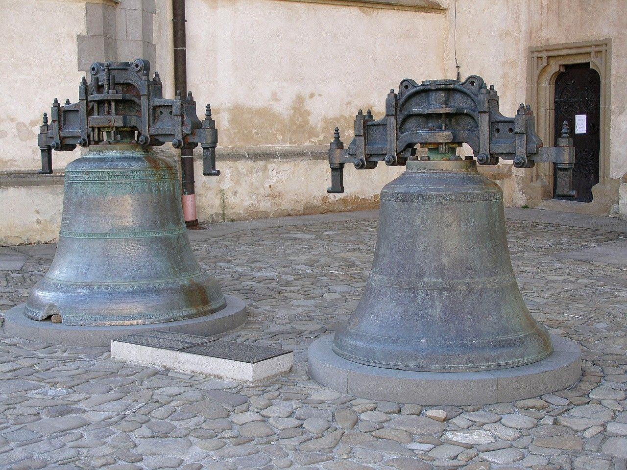 Bazilika sv. Egídia, zvony Urban (vľavo) a Ján (vpravo) pred bazilikou This medium shows the protected monument with the number 701-1679/0 in the Slovak Republic.